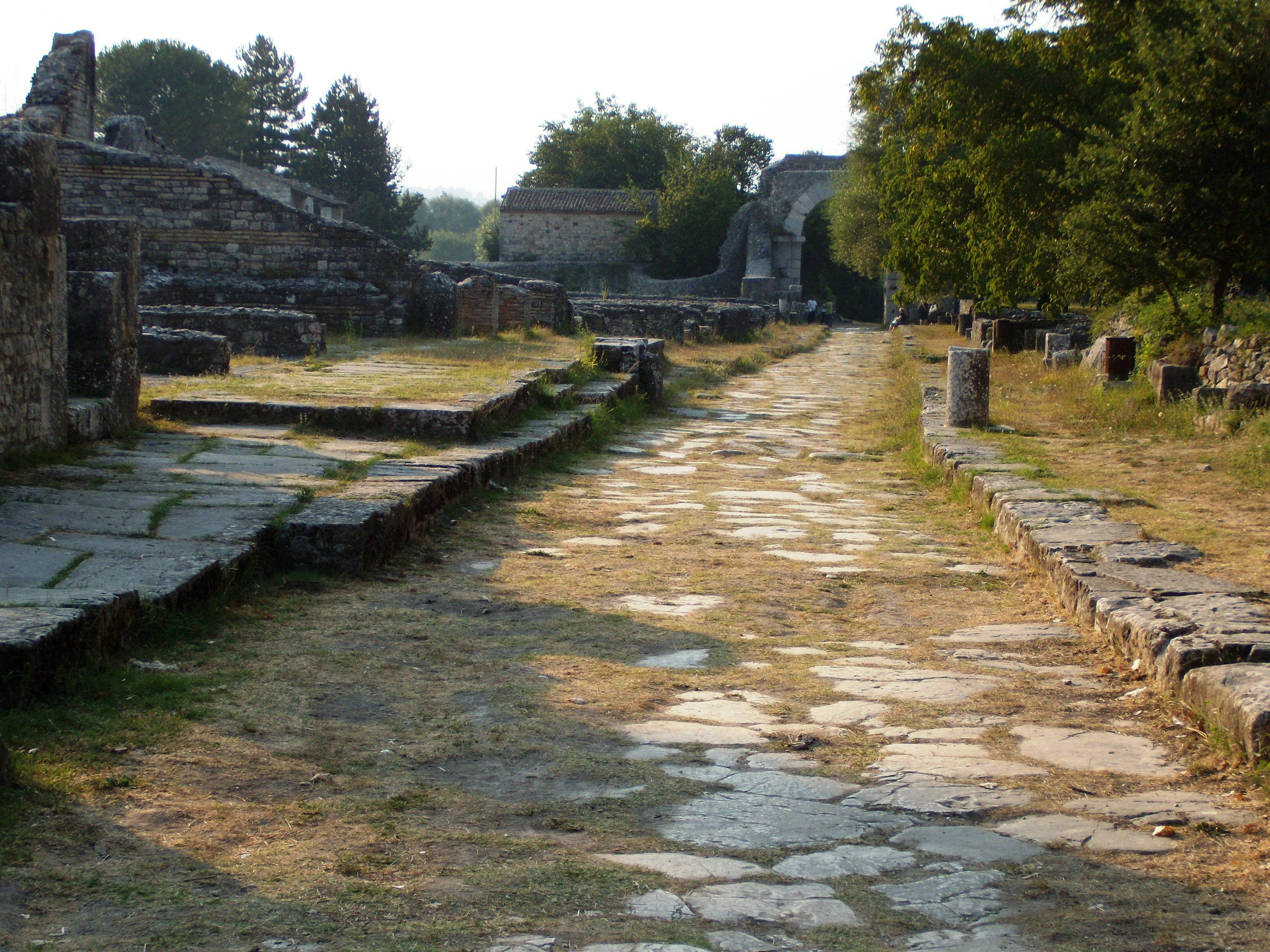 Scavi archeologici di Saepinum (Italy): strada selciata di epoca romana.